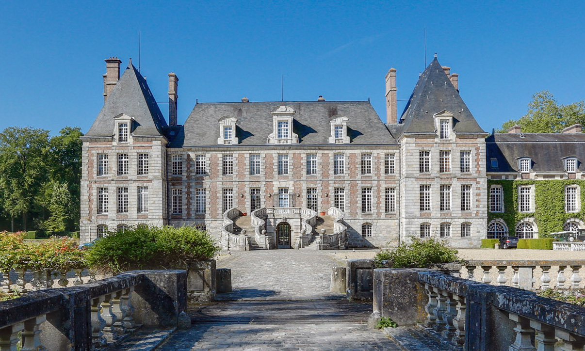 Eingangsfassade des Schlosses Courances